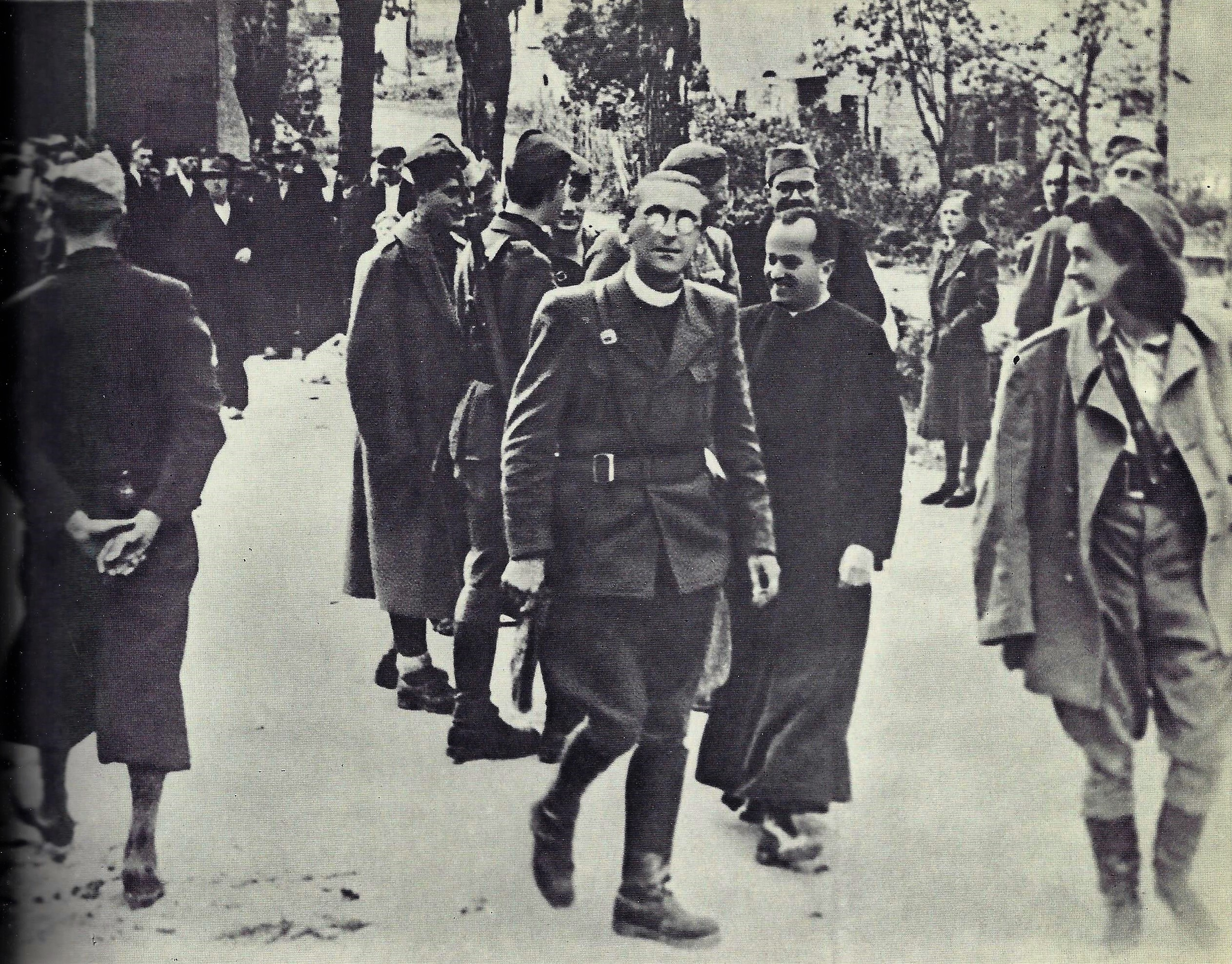 Po partizanskem mitingu v Prezidu septembra 1943, v ospredju verski referent XIV. divizije Jože Lampret, drugi duhovnik pa je domači župnik iz Prezida